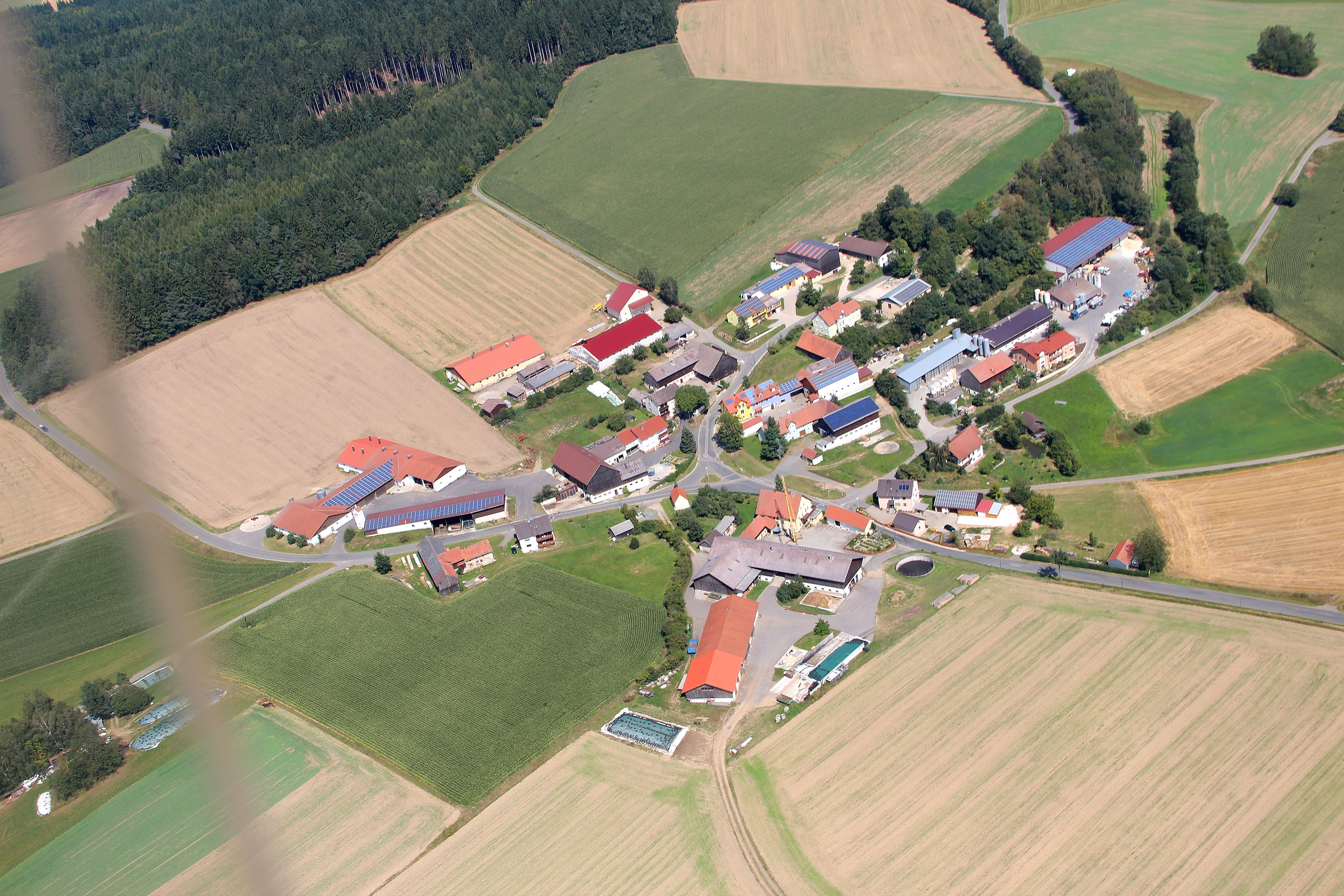 Schömersdorf (Gemeinde Teunz, Landkreis Schwandorf, Oberpfalz, Bayern)